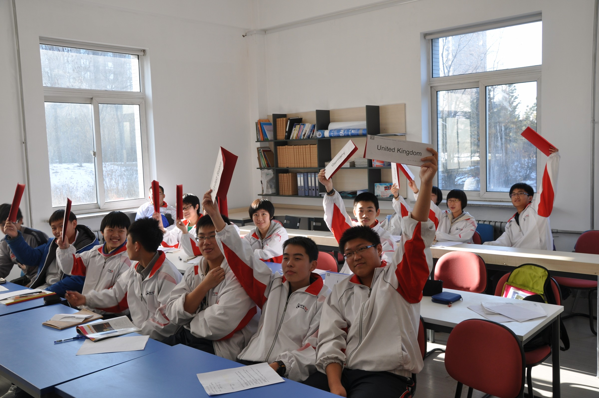 classe_NEYC